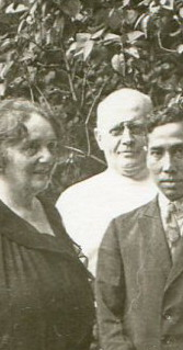 Im Garten des Reichsgesundheitsamts: Margarete Zuelzer (Mitte), Wilhelm Schüffner (2. von links) und Paul Uhlenhuth (3. von rechts)